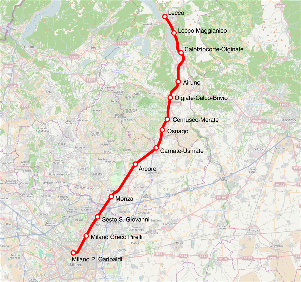 Mappa della linea S8 del servizio ferroviario suburbano di Milano.